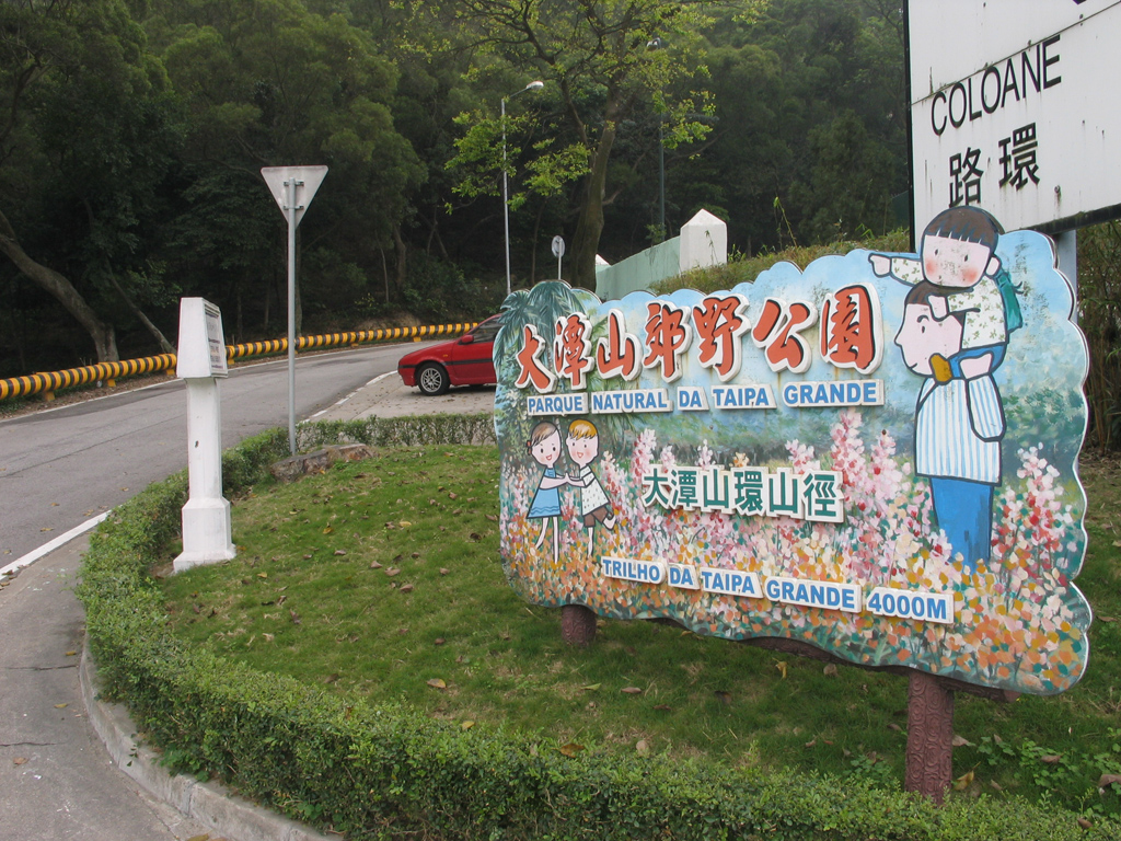 澳門氹仔大潭山郊野公園入口(雞頸馬路旁) Parque Natural da Taipa Grande, Macao Photo taken by Glio